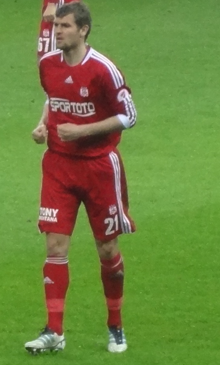 Navratil GS Türkiye kupası maçında